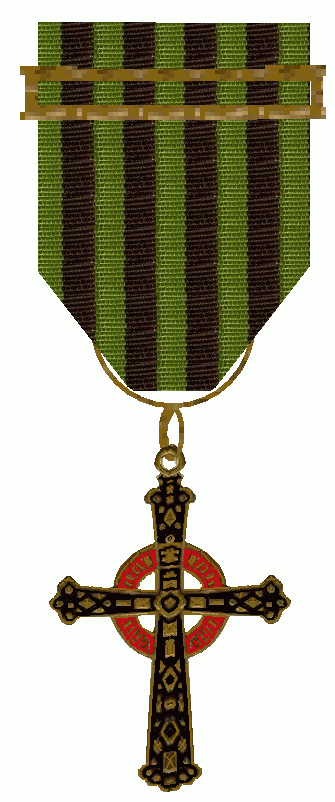 Orden de la Legitimidad Proscrita Orde van de legitieme Successieoorlog Carlistische Beweging